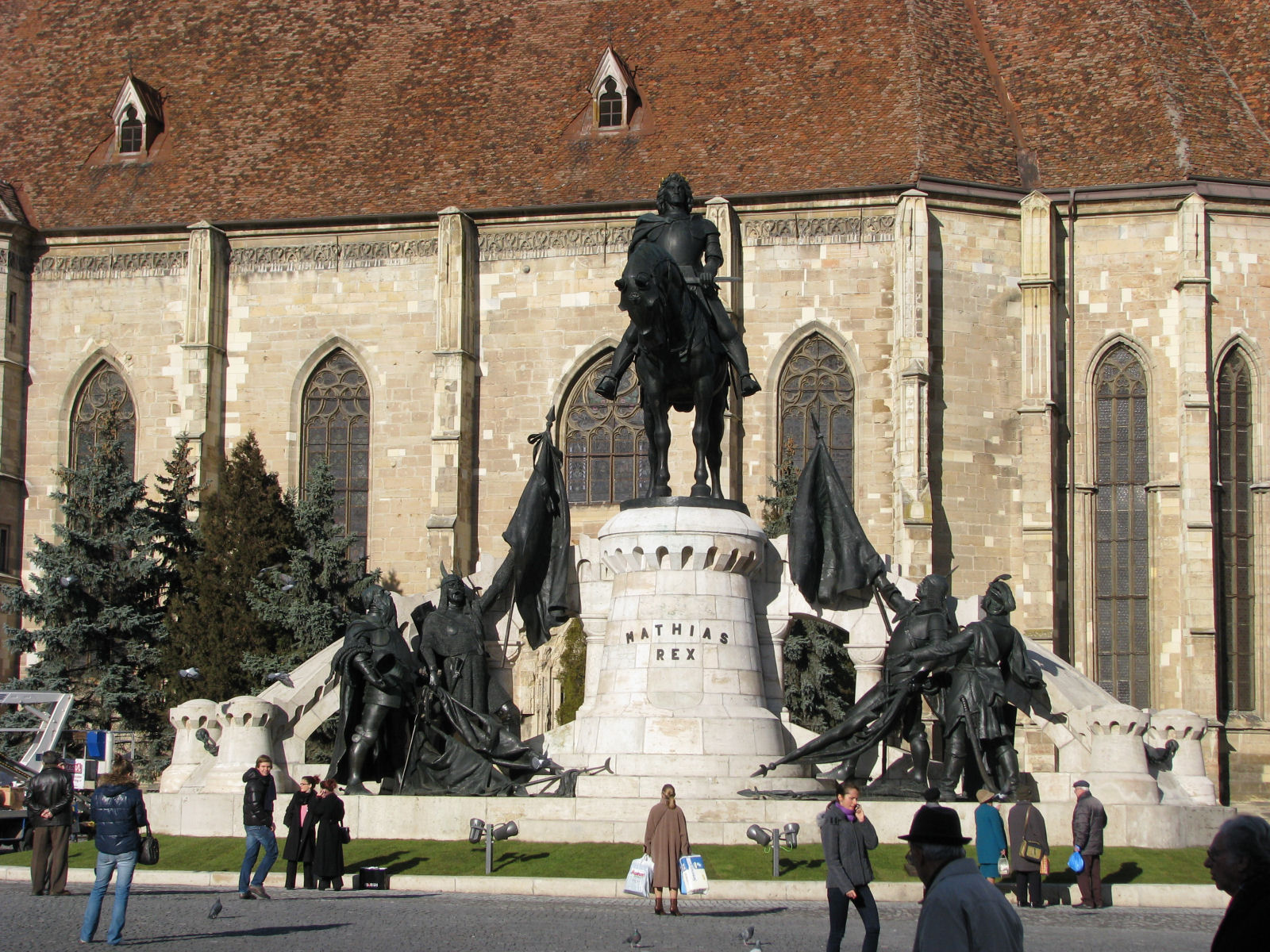 A felújított kolozsvári Mátyás király szobor. Ez a szobor nem az eredeti Mátyás király szobor hanem annak átalakított, szétszedett mások szerint felújított változata. Eredetileg nem Mathias Rex név volt a talapzatra írva, hanem magyarul Mátyás király név volt ráírva alatta a Nagy-Magyarország címerével.